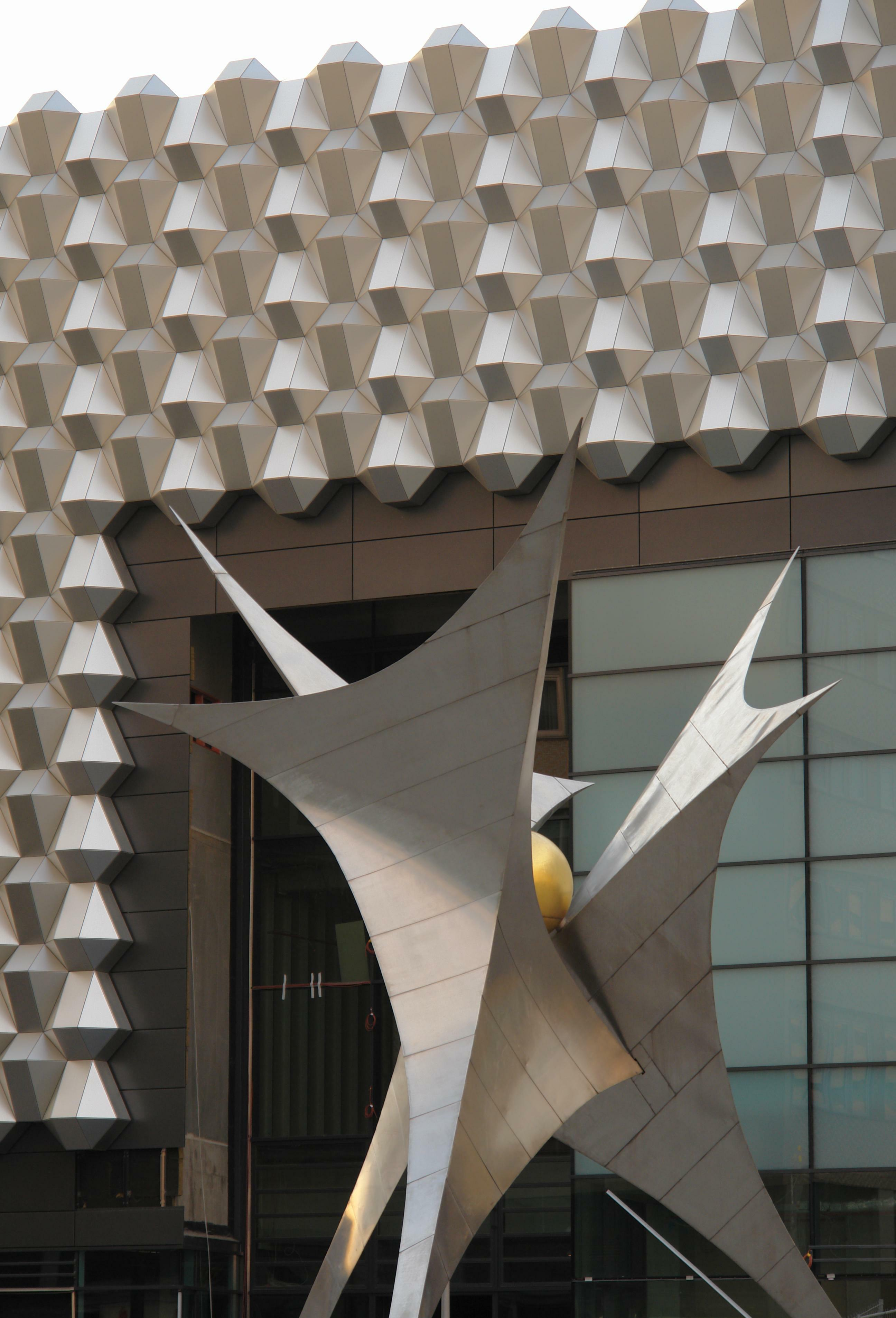 Neubau der Centrum-Galerie, davor die Skulptur von Wolf-Eike Kuntsche